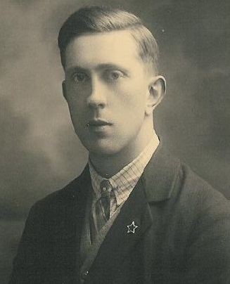 Drukker Henri Braekevelt (1907-1999) uit Roeselare